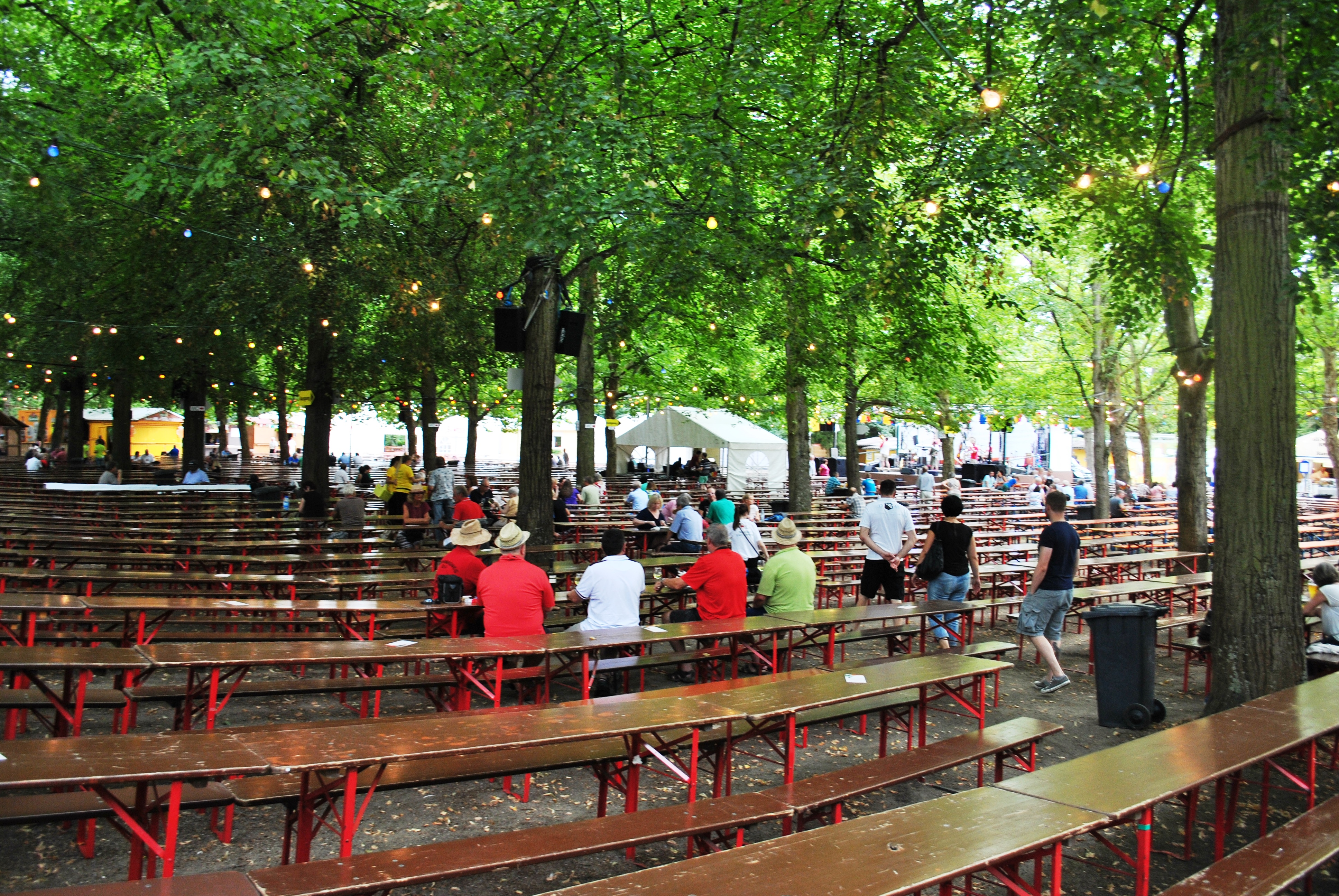 Fränkisches Weinfest Volkach, Hindenburgplatz mit Festgelände und Bühne